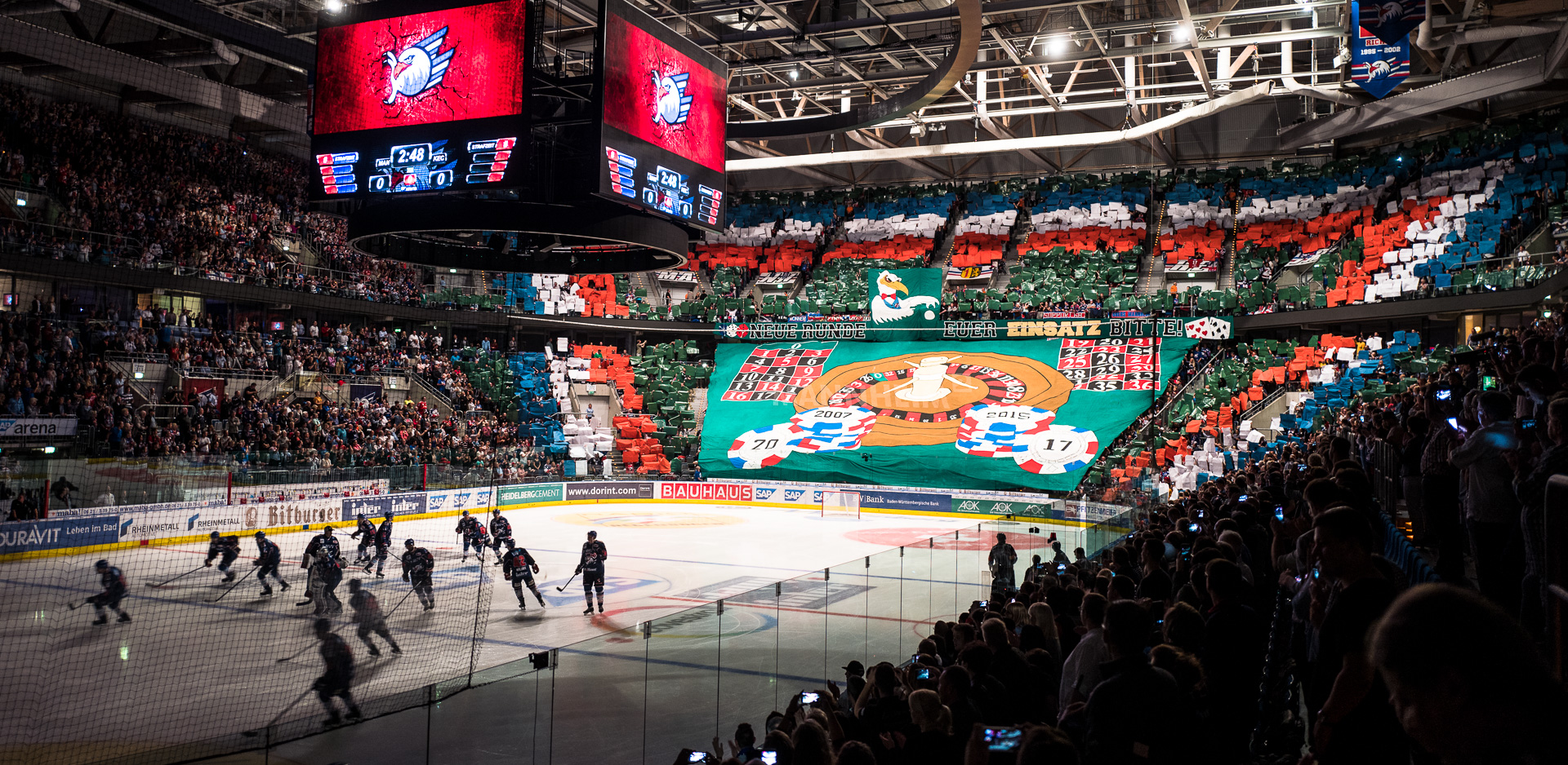 ..fing zwar schlecht an - aber die Saison ist ja lang!